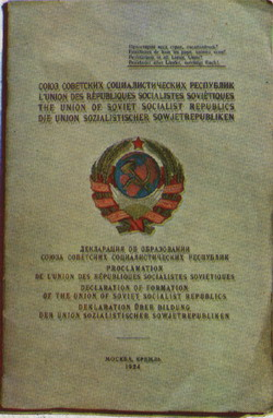 обложка Декларации об образовании СССР